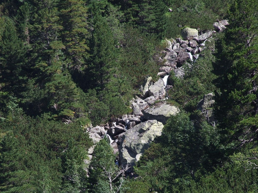 Zmarzły Potok w Dolinie Złomisk (Tatry Wysokie)